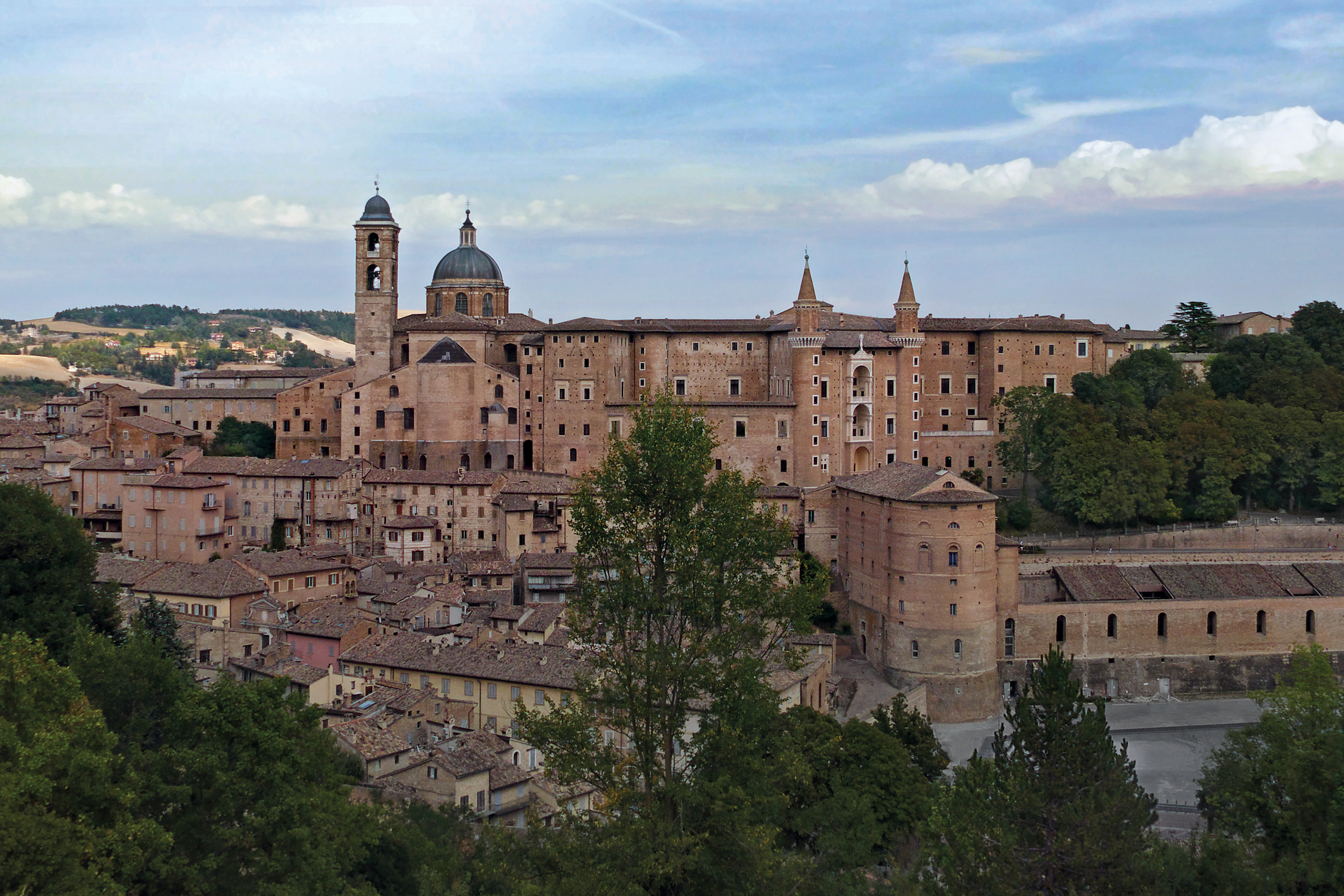 Поглед на стари део Урбина